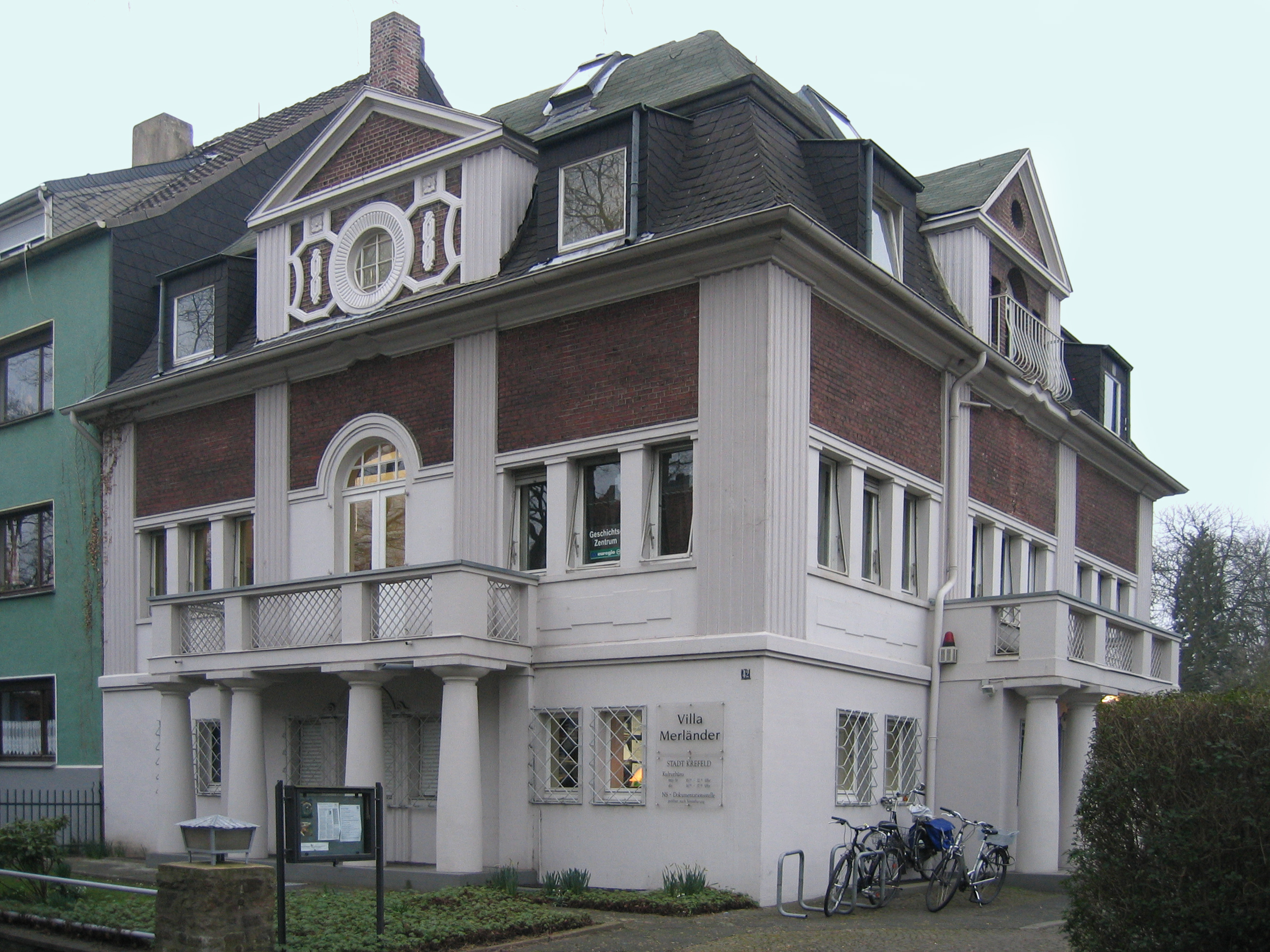 Villa Merländer in Krefeld-Cracau, Friedrich-Ebert-Straße 42, erbaut 1924/1925